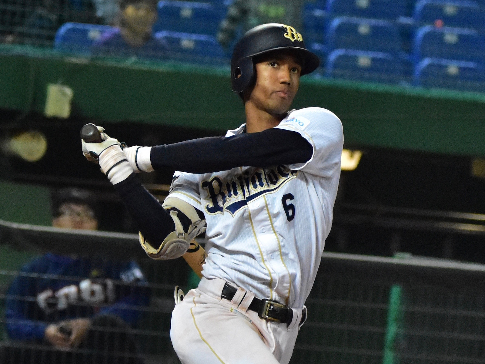 2016年12月17日、台中インターコンチネンタル野球場にて